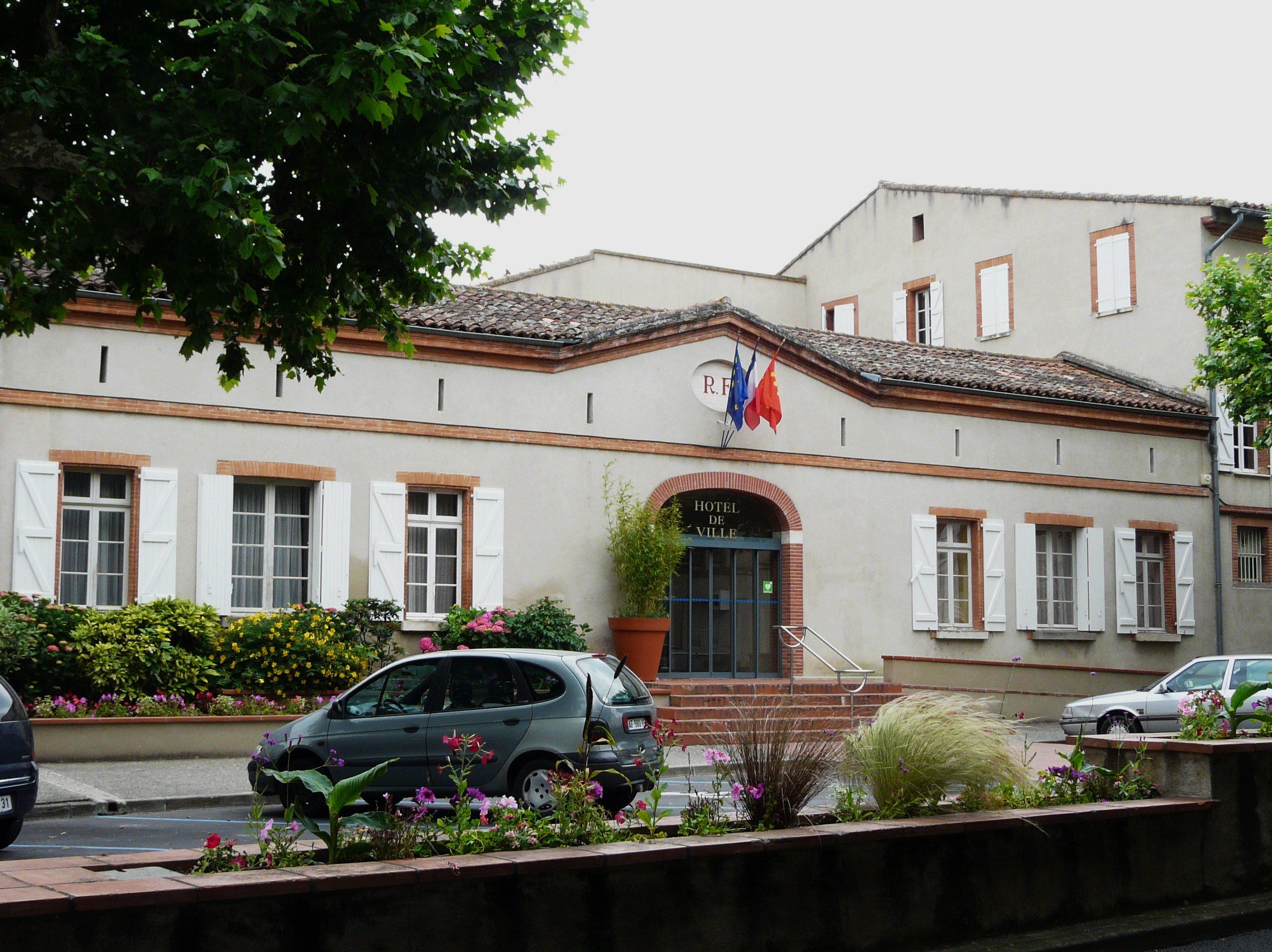 L'hôtel de ville de Carbonne, Haute-Garonne, France.